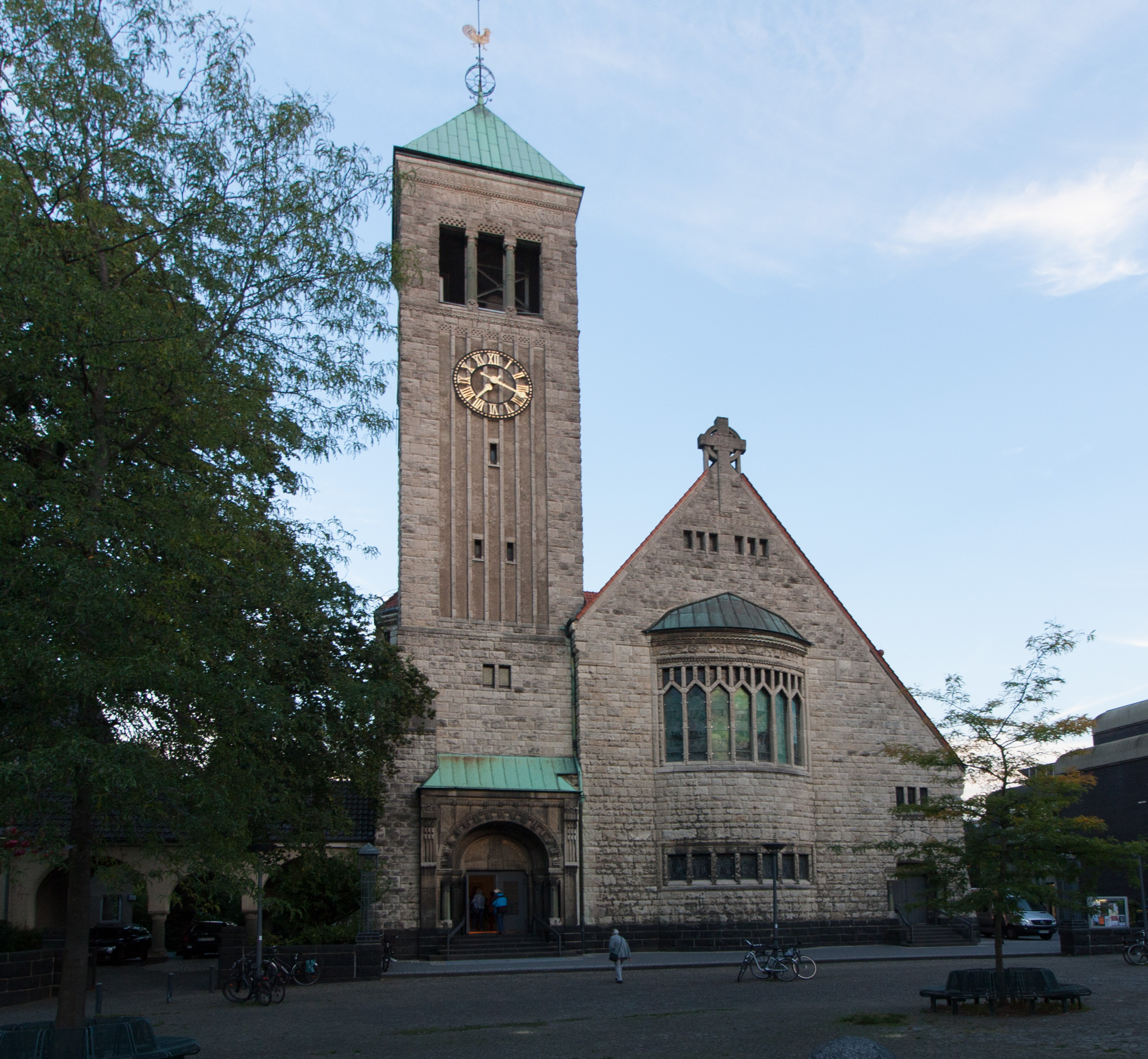 Recklinghausen, Christuskirche, Limperstraße 13This is a photograph of an architectural monument., no. 55